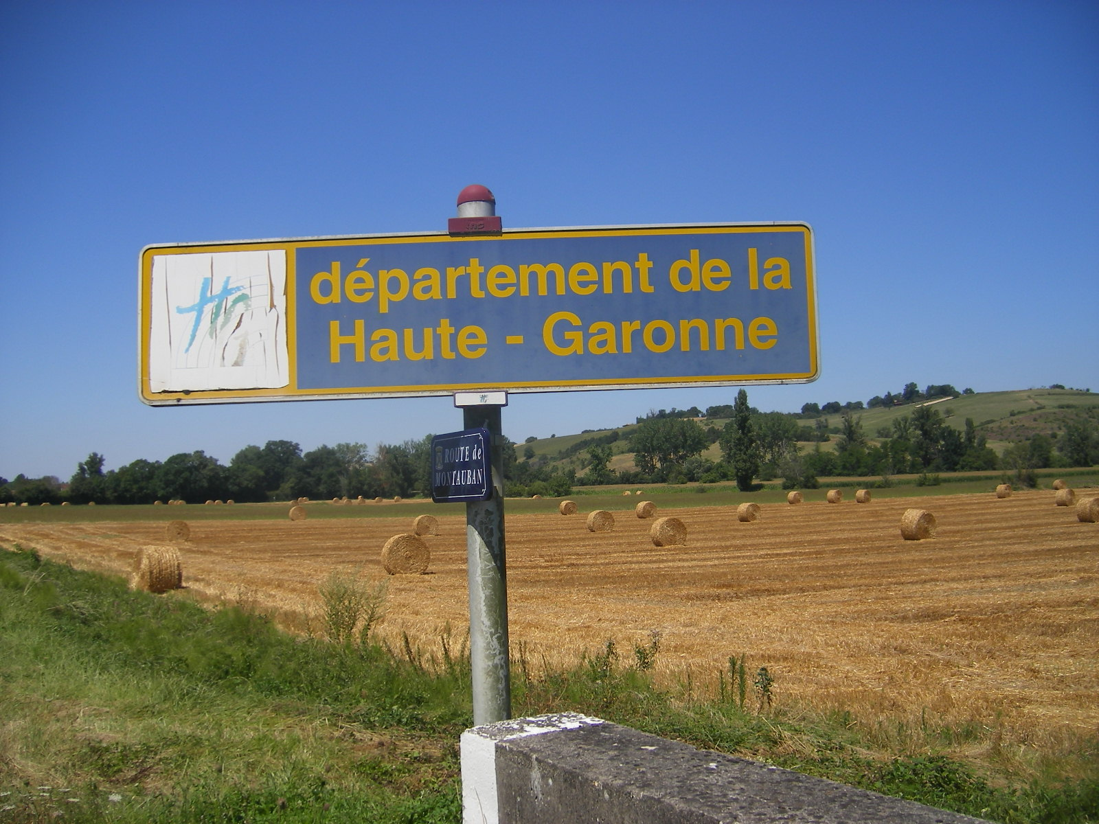 Border sign at D999 route between Tarn and Haute-Garonne (Labéjeau, commune Le Born)